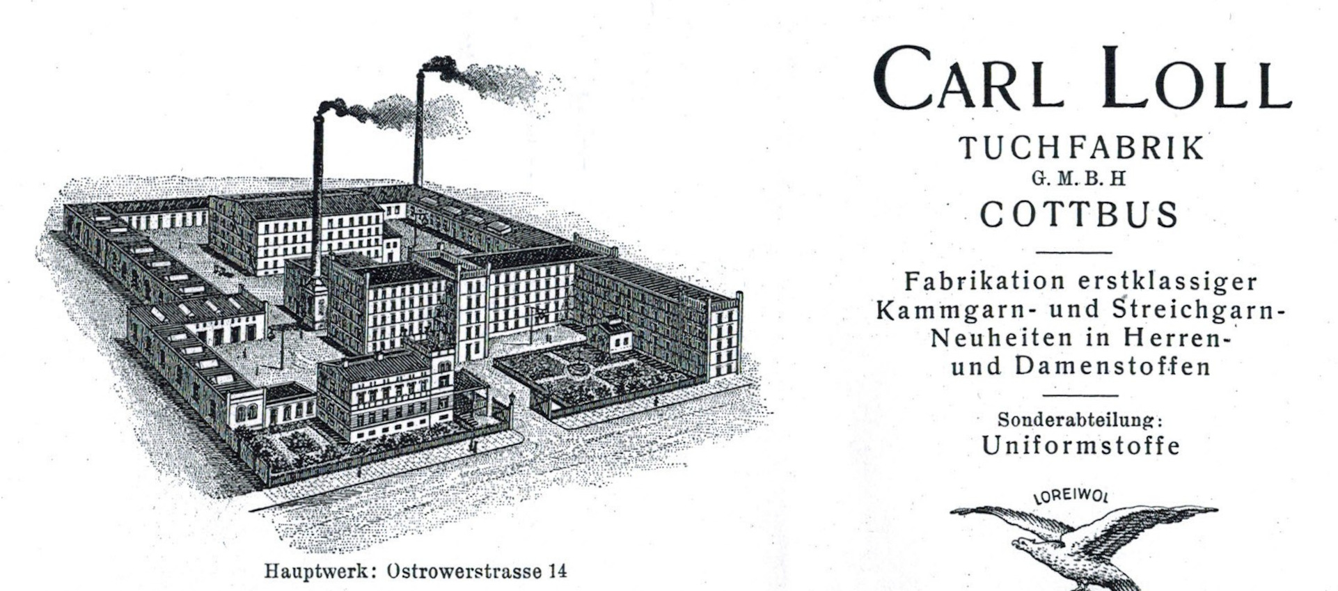 Fabrik Loll, früher